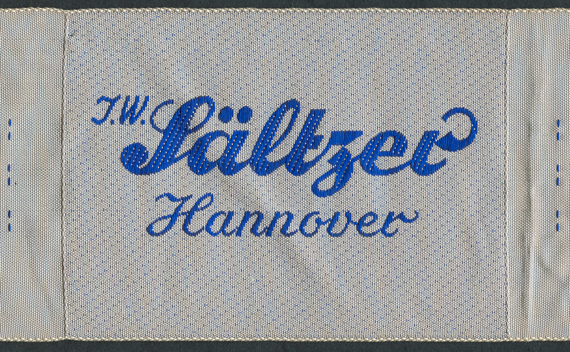 Kauf- und Versandhaus J. W. Sältzer in Hanover; Detail eines maschinengenähten Gewebebandes mit dem Schriftzug der Firma, Vorderseite